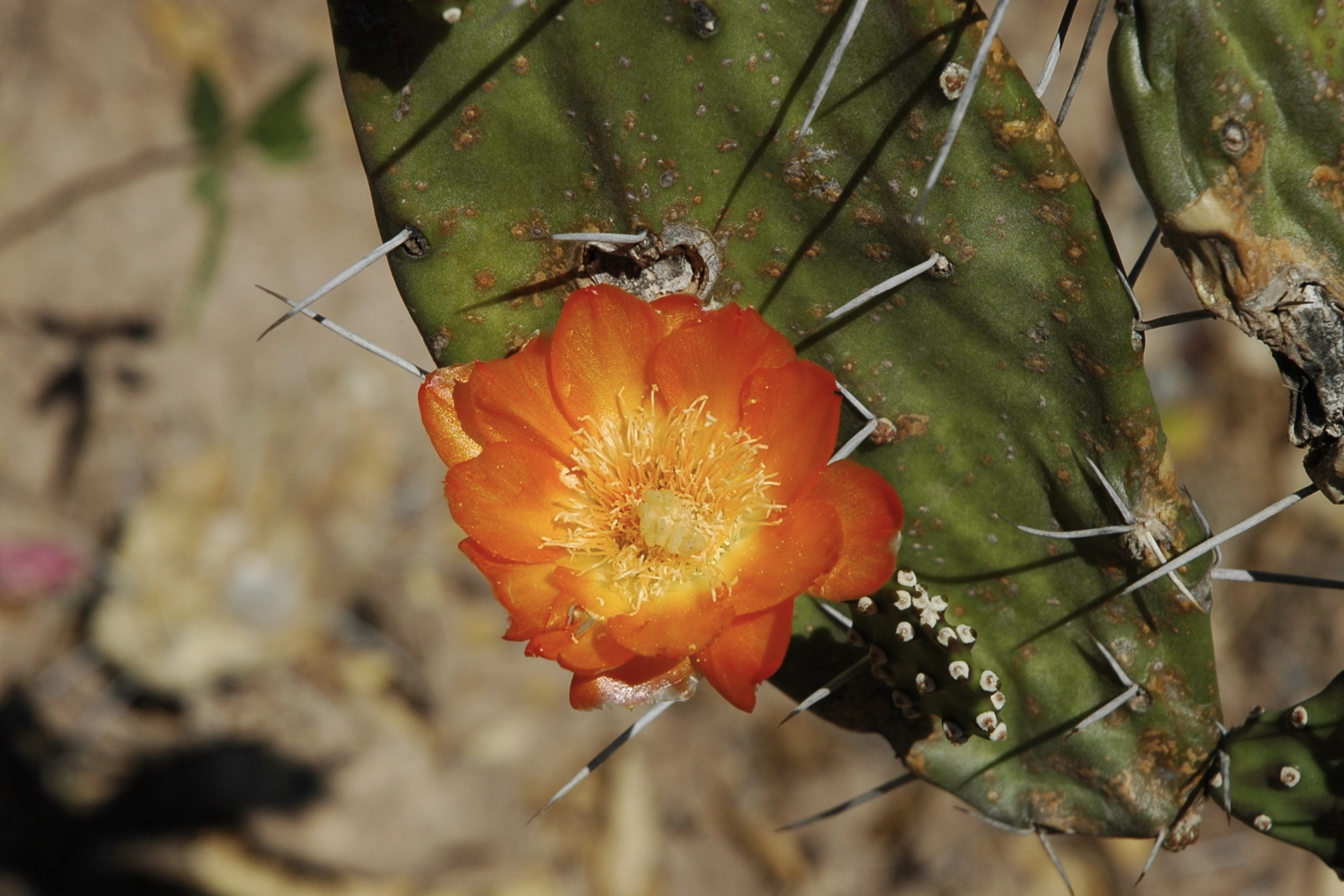 Opuntia quimilo. Nueva Pompeya.